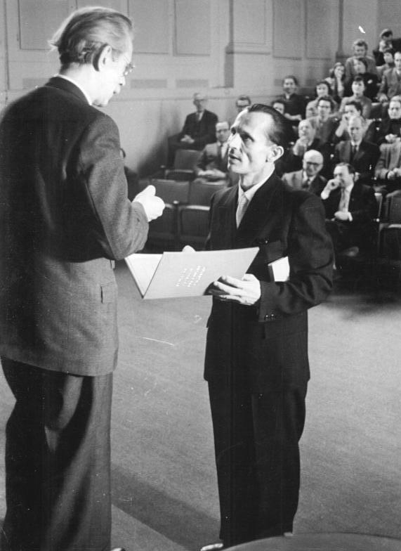 Berlin, Verleihung Heinrich-Mann-Preis an Johet Zentralbild Weiß 27.3.1958 "Heinrich-Mann-Preis" verliehen In einer öffentlilchen Plenarsitzung der Deutschen Akademie der Künste in Berlin wurde am 27.3.1958 vom Präsidenten der Akademie, Prof. Otto Nagel, der "Heinrich-Mann-Preis" für schriftstellerische Arbeiten verliehen. Frau Leonie Mann-Askenary, die Tochter des Dichters wohnte der Sitzung bei. UBz: Prof. Nagel (links) verleiht den Preis I. Klasse an Herbert Jobst. Abgebildete Personen: Nagel, Otto Prof.: Maler, Präsident der Akademie der Künste (AdK), Nationalpreisträger, Vaterländischer Verdienstorden (VVO) in Gold, DDR (GND 118586300)